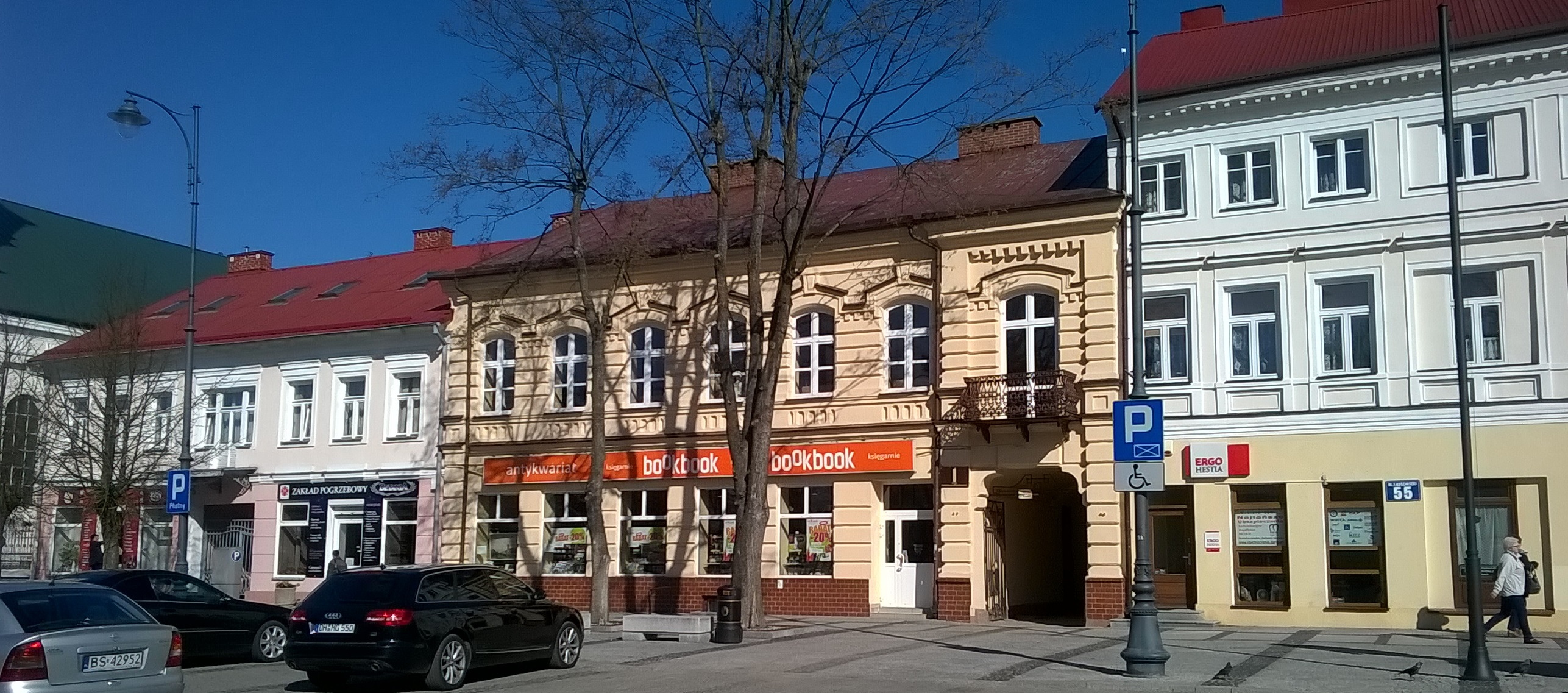 Suwałki. Plac Piłsudskiego. W budynku, w którym obecnie funkcjonuje księgarnia, przed I wojną światową działała piekarnia-cukiernia prowadzona przez Turka Szeryfa Giulaba bądź Sheriffa Gulapa.